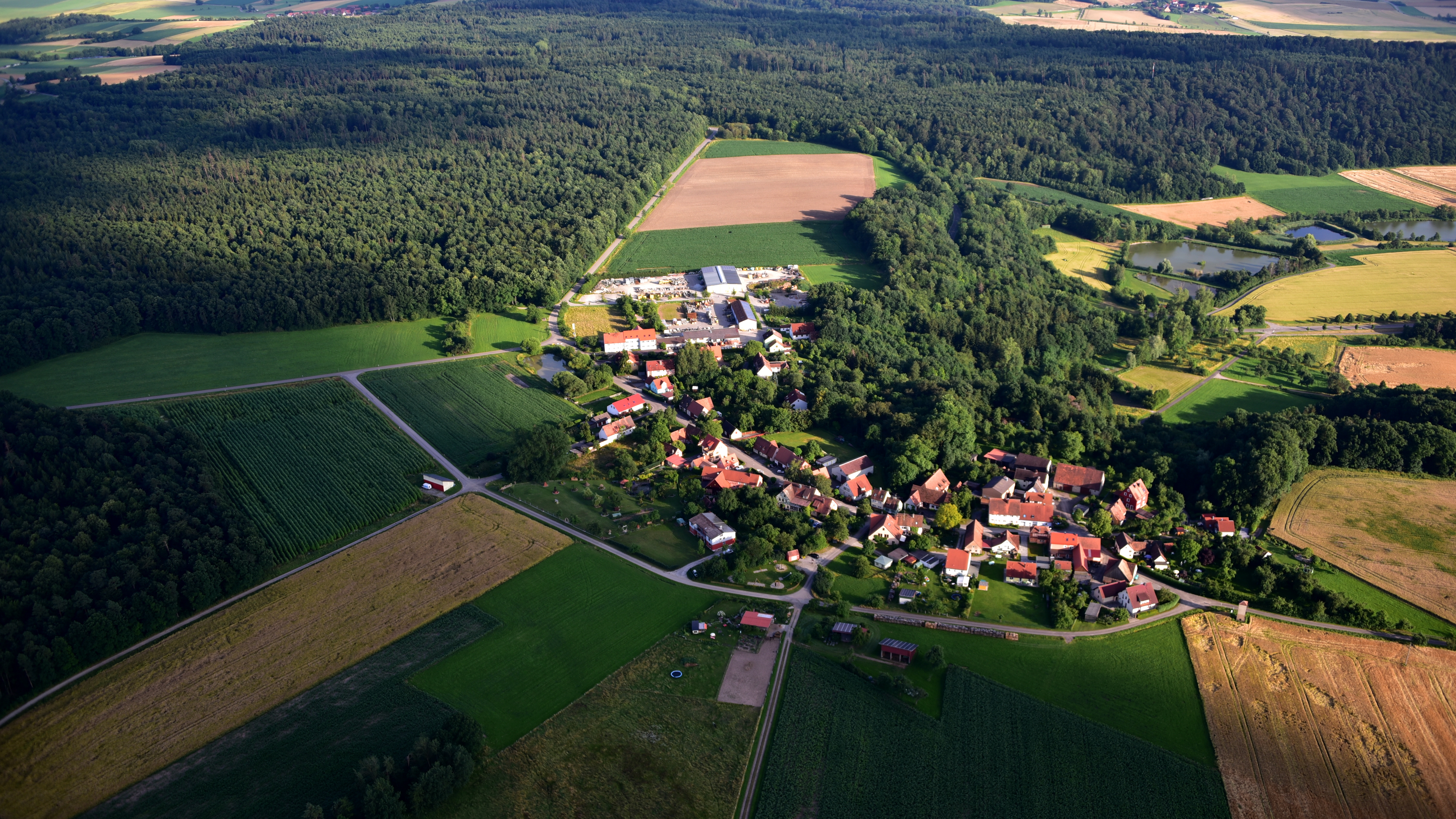 Wachsenberg (Neusitz), Luftaufnahme (2016)